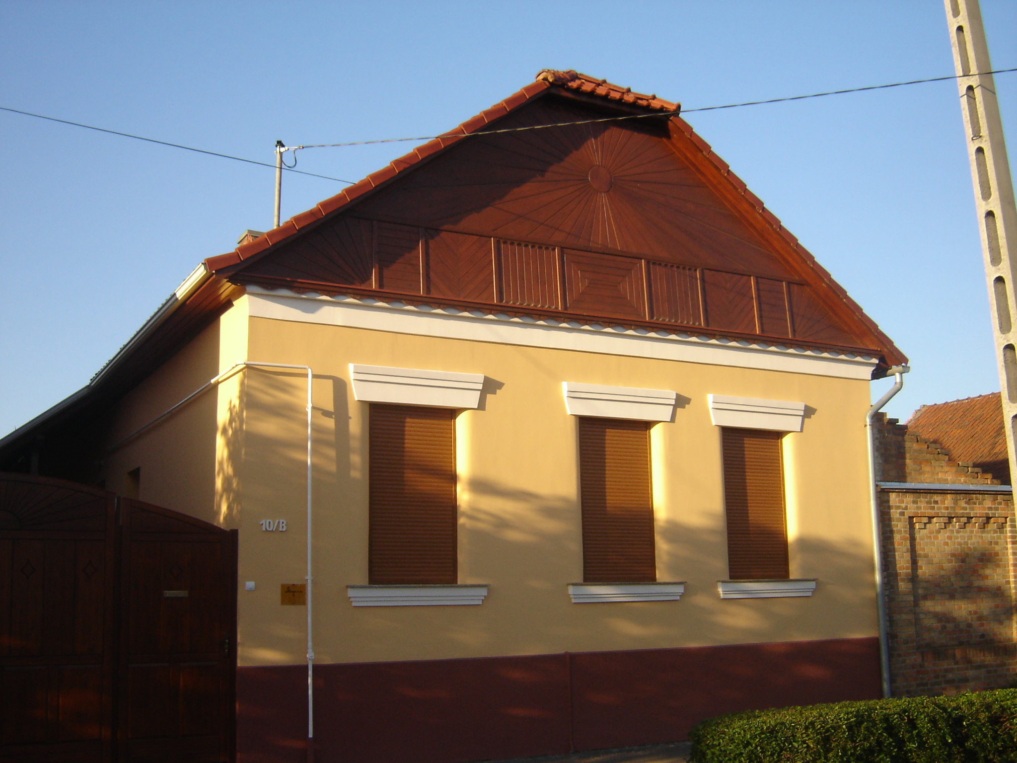 Felújított napsugaras ház, Tompa Mihály utca, Szeged-Alsóváros